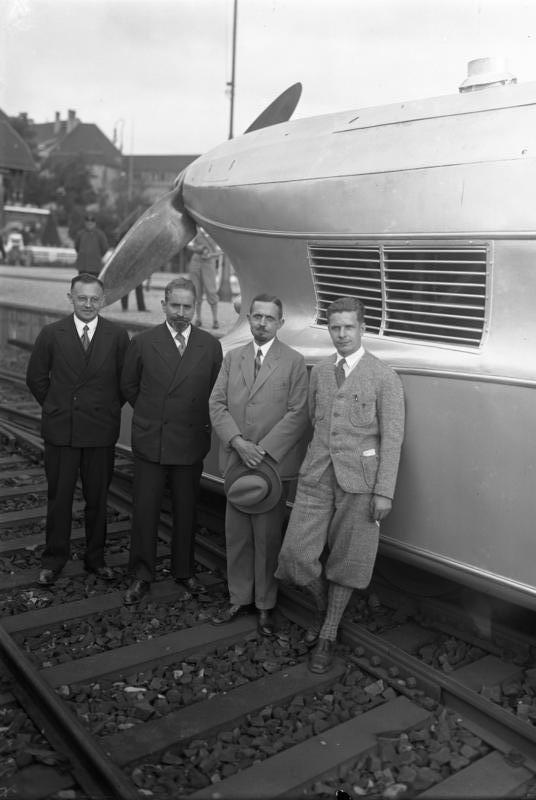 Der Schienenzeppelin, der Propellerwagen des deutschen Ing. Kruckenberg, rast mit 230 km Stundengeschwindigkeit von Hamburg nach Berlin. Die verdienstvollen Förderer des Schienenzeppelins von links nach rechts: Ing. Heyner, Ober-Ing. Kruckenberg, Ing. Stedefeld und Ing. Black, welcher den Schienenzeppelin von Hamburg nach Berlin führte.